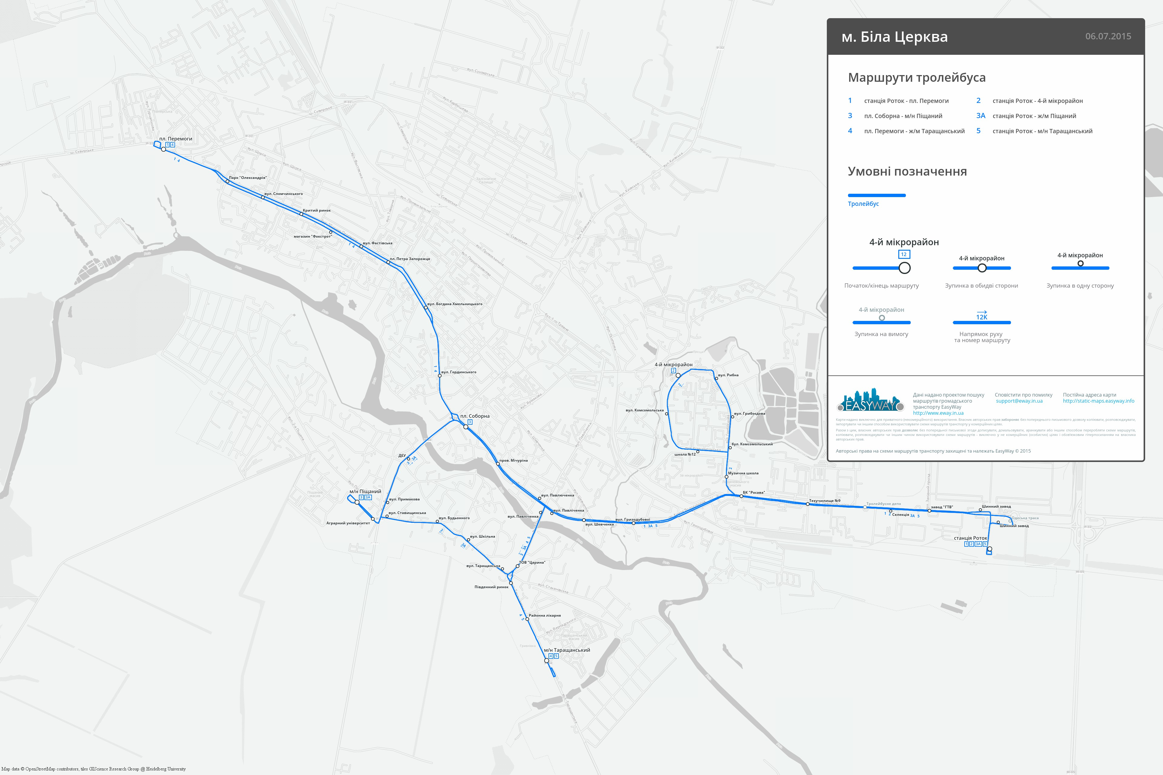 Схема тролейбусних маршрутів у місті Біла Церква